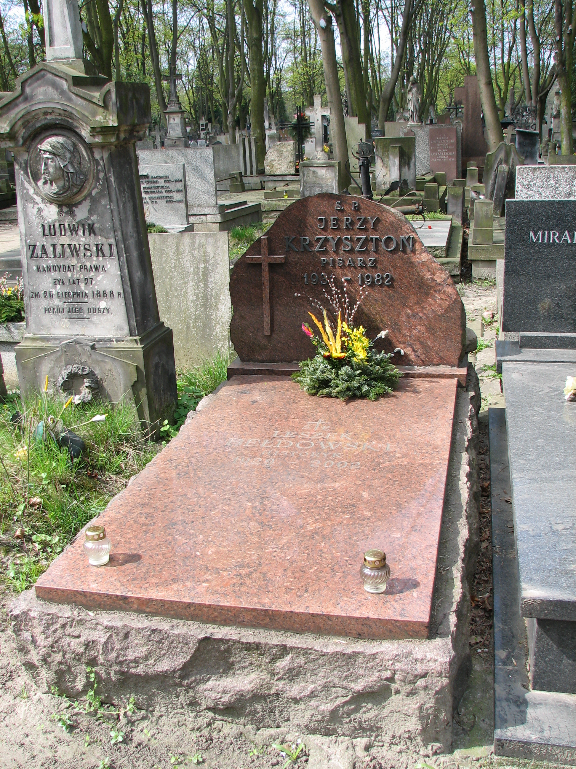 Jerzy Krzysztoń's monument (Powązki Cemetery)